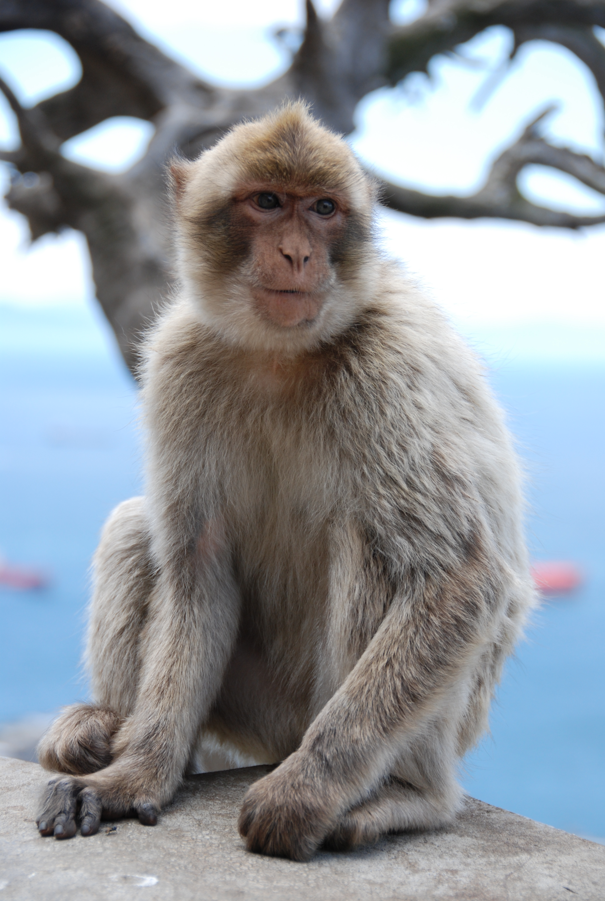 Monkey